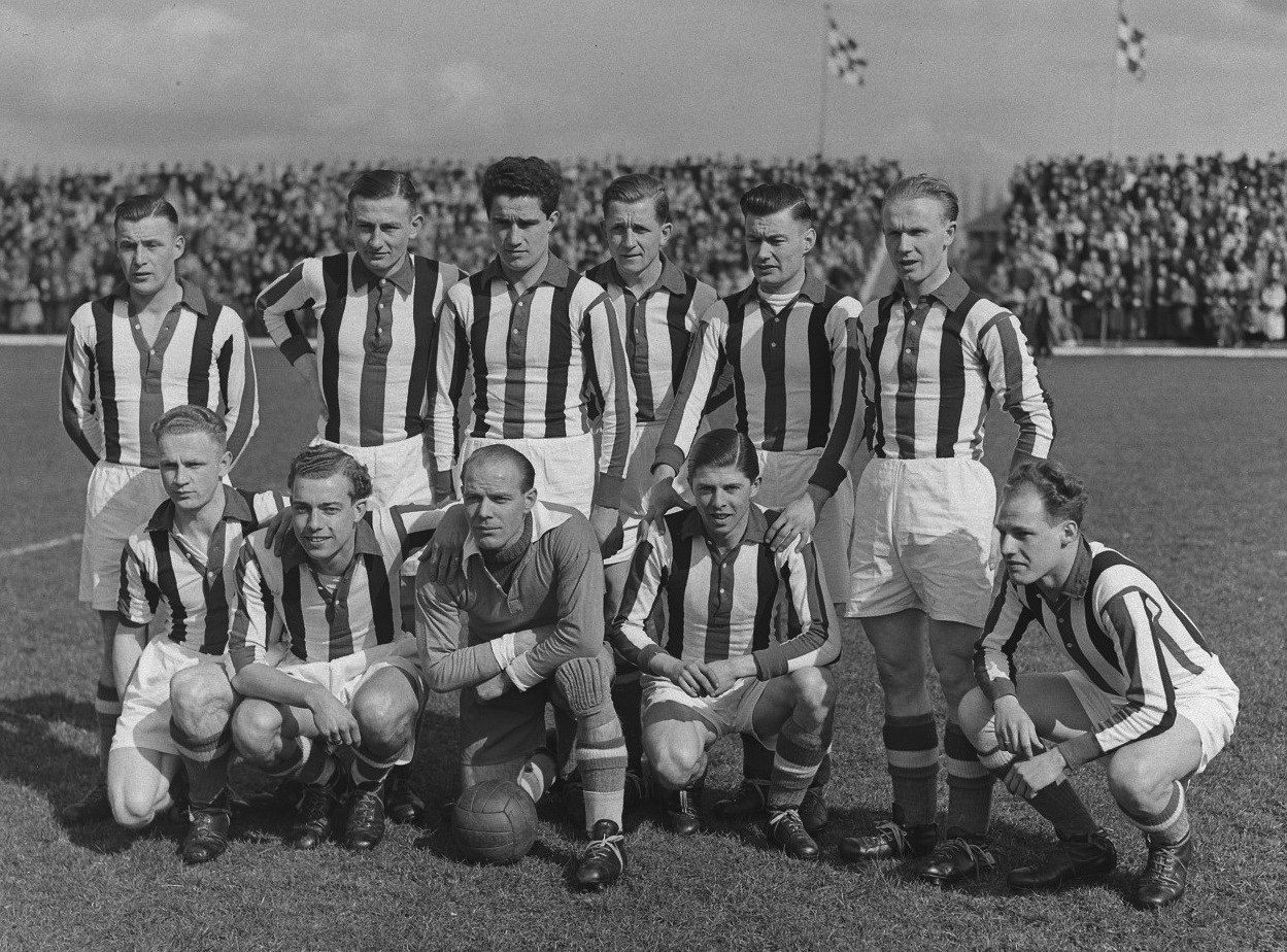 Willem II tegen NAC. Willem II elftal.